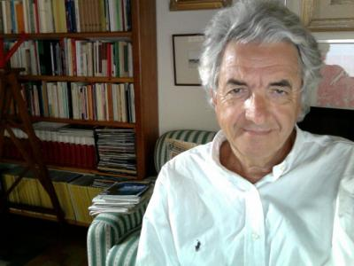 Tito Barbini